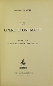 Енріке Бароне "Принципи фінансової економіки, 1937"